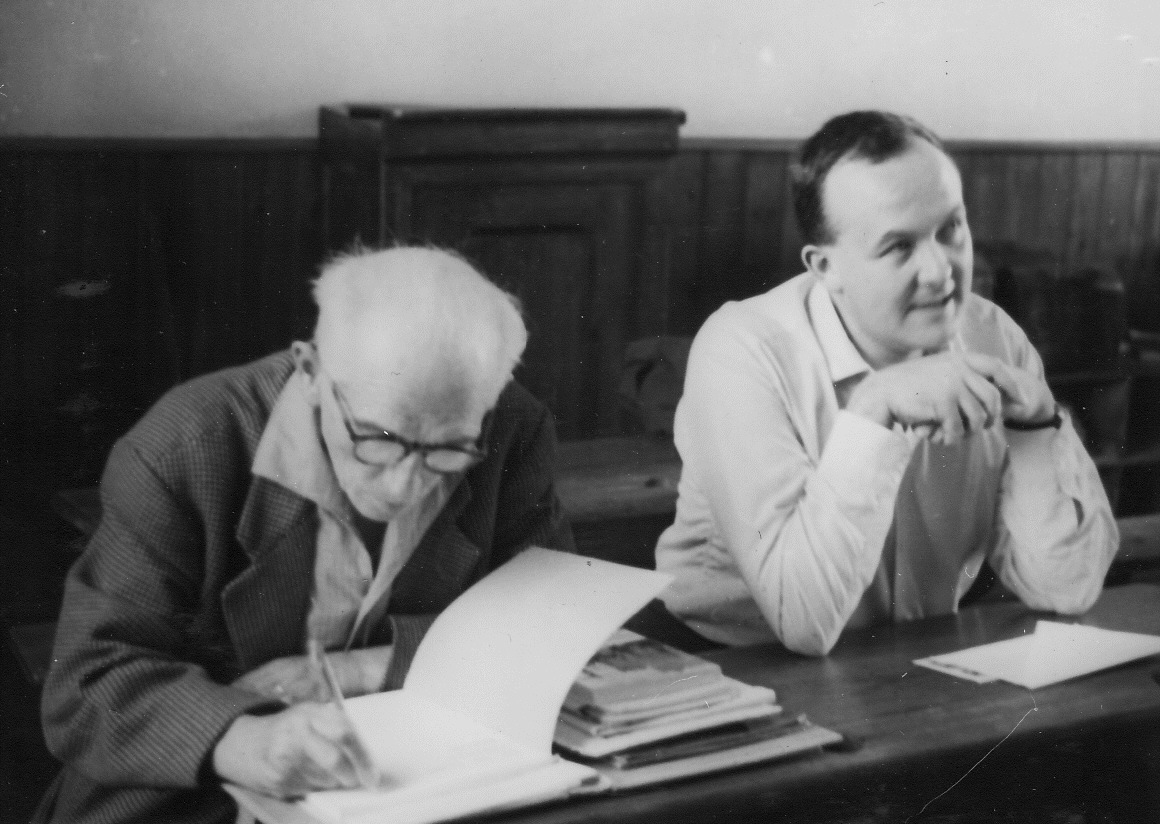 Guy Etienne ha Fañch Elies Abeozen e Kamp ar Vrezhonegerien 1959